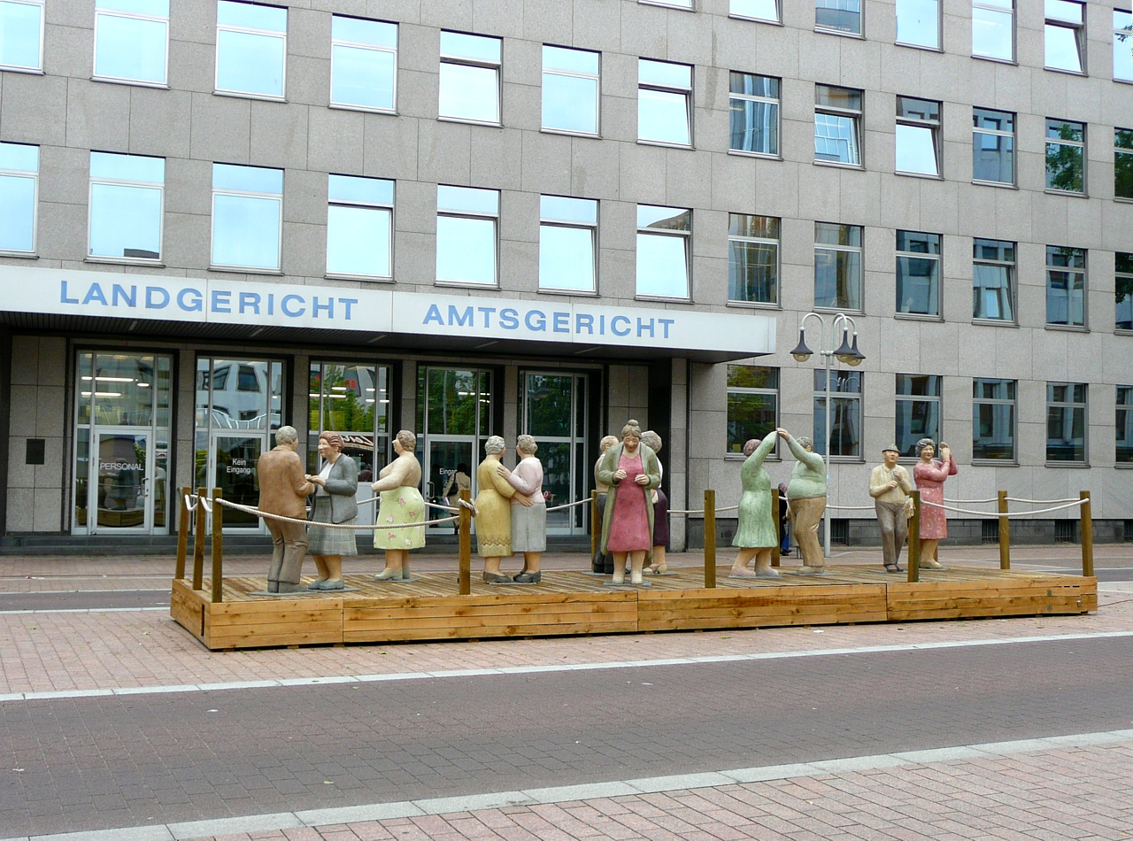 Bochum